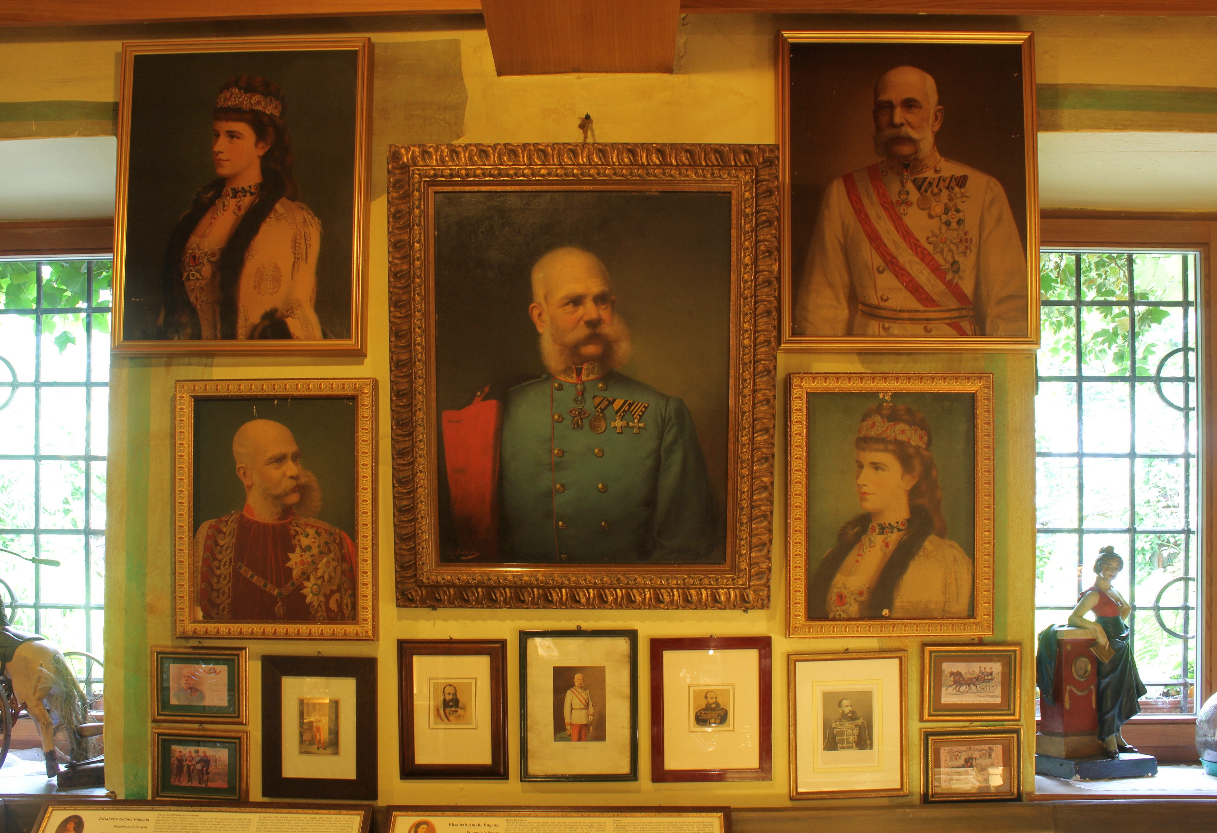 Partschins K.u.K. Museum Gemälde